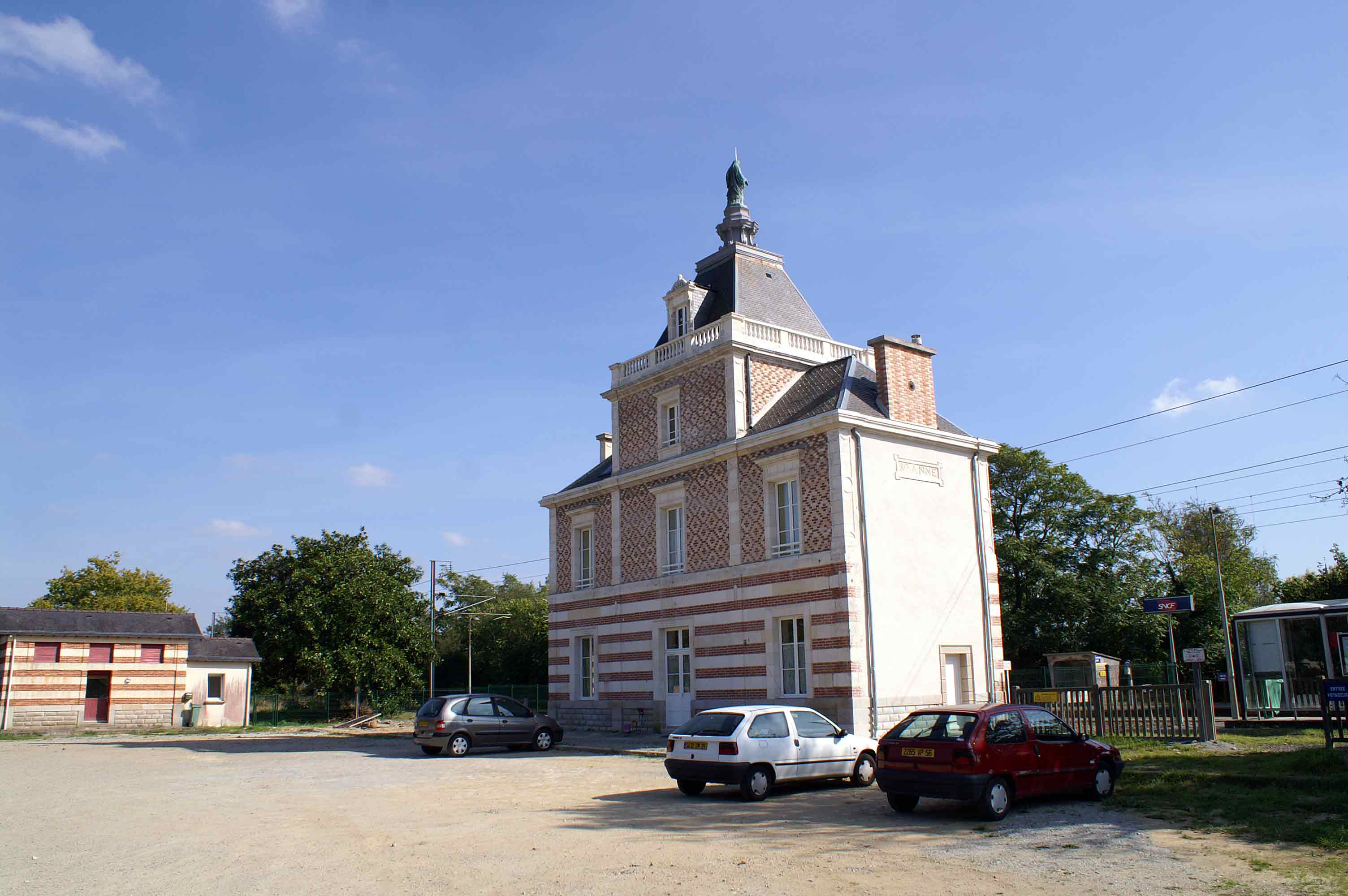 Façade "ville" de la gare, le bâtiment voyageur est maintenant un immeuble d'habitation social, l'entrée de l'arrêt est située à droite du bâtiment. Le petit bâtiment d'origine est également une habitation.